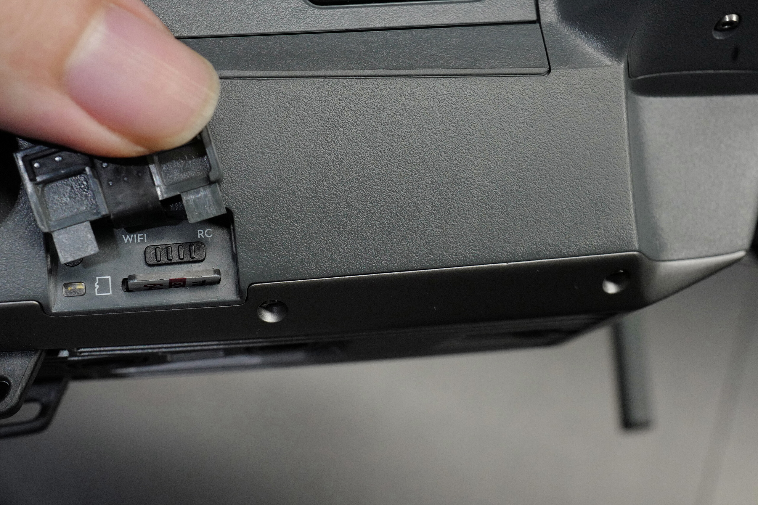 大疆Mavic Pro侧面的TF卡槽，与遥控模式切换开关。遥控支持专属遥控器，或者是WiFi连接智能设备。